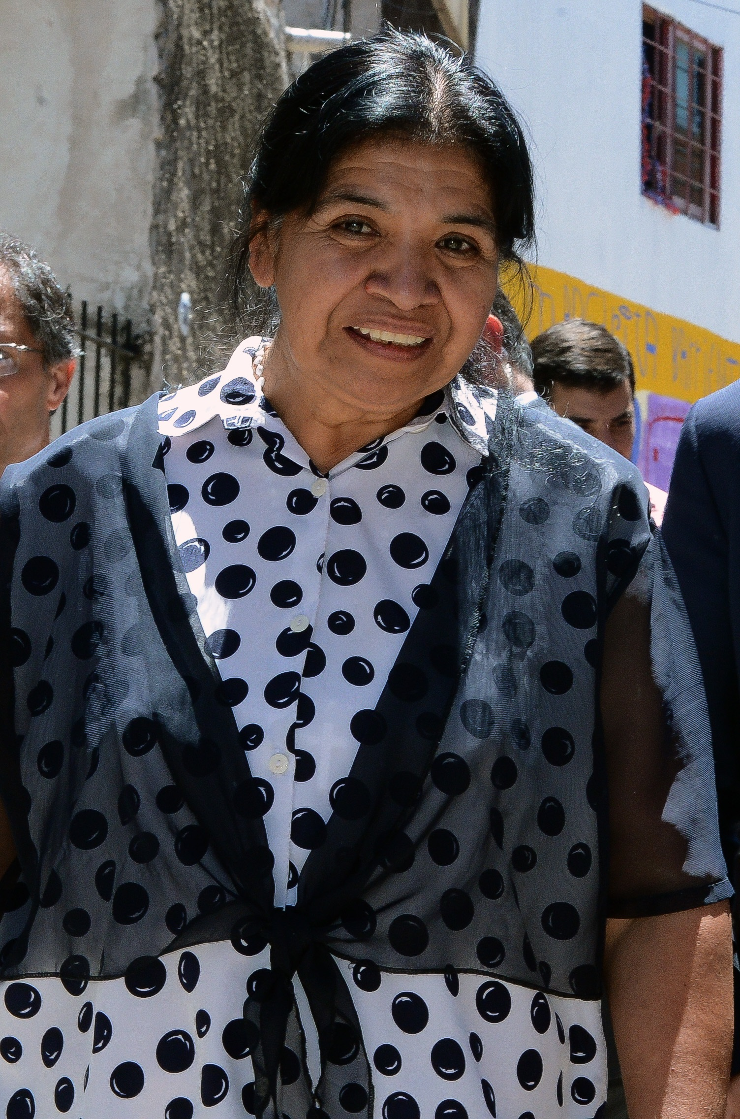 El presidente Mauricio Macri visitó esta mañana el Comedor Los Piletones, fundado por Margarita Barrientos y ubicado en el barrio de Villa Soldatti, en la ciudad de Buenos Aires.